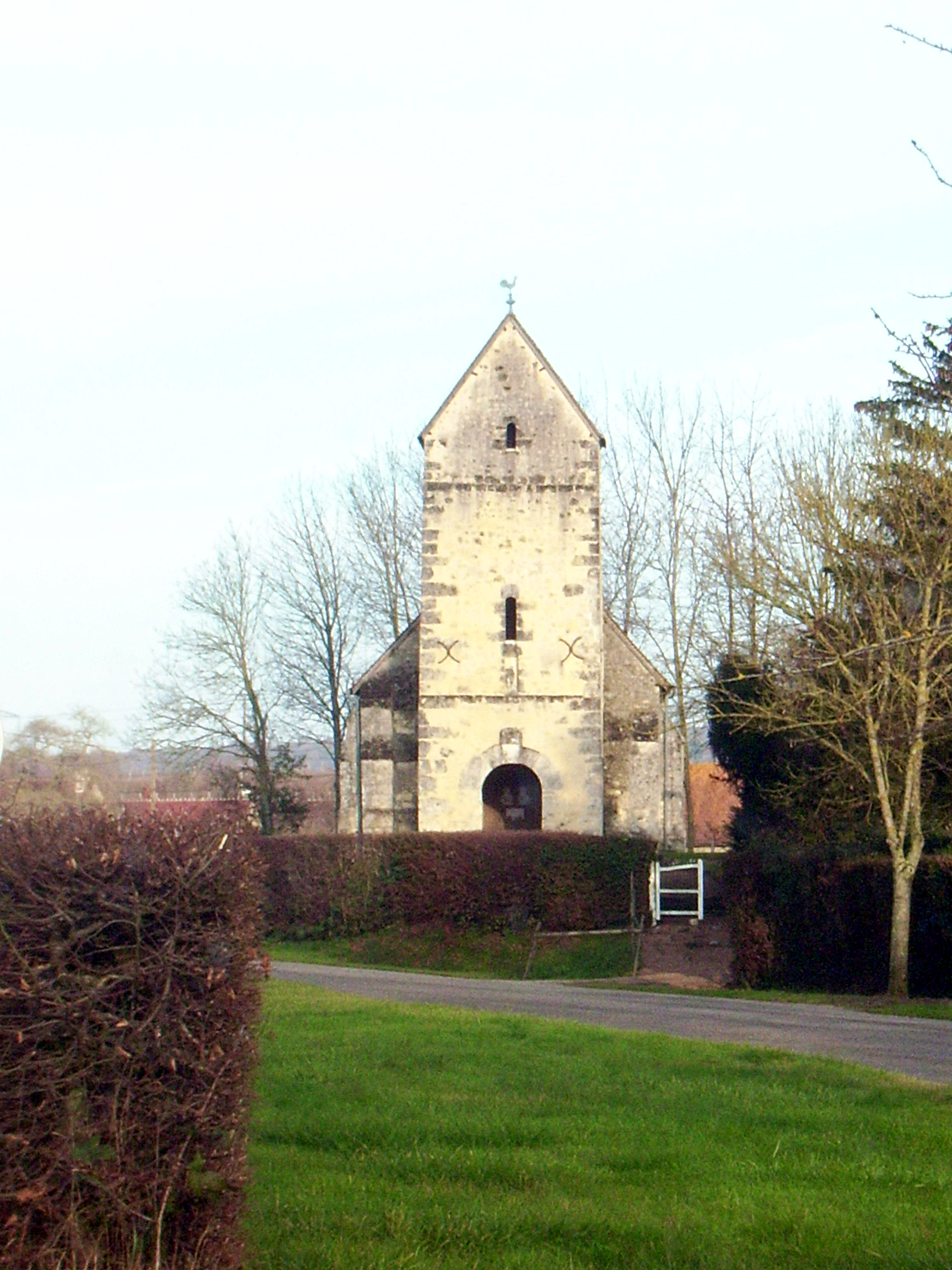 eglise de Boëcé